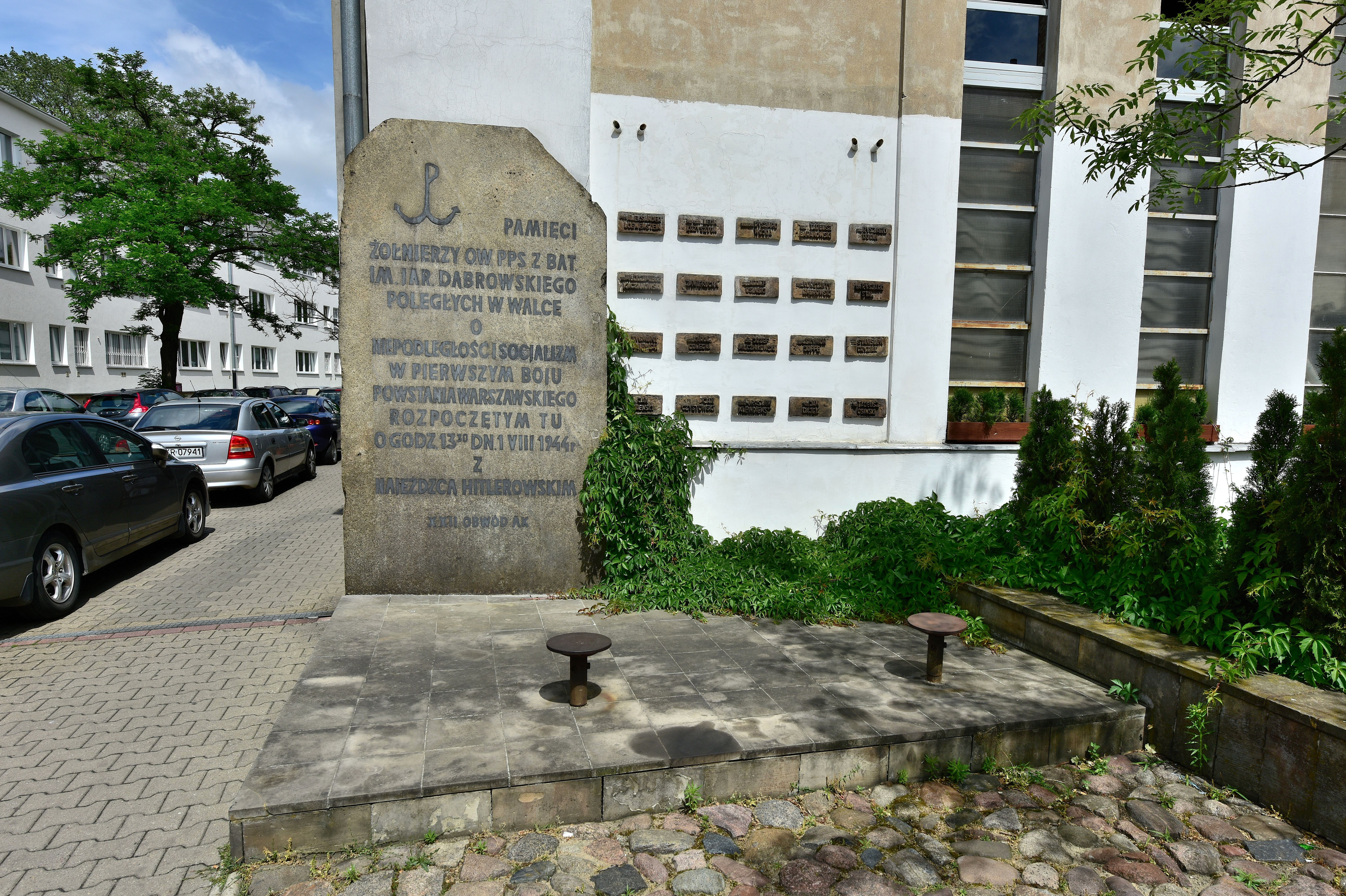 Ulica Adama Próchnika róg Pawła Suzina upamiętnienie pierwszych walk w powstaniu warszawskim